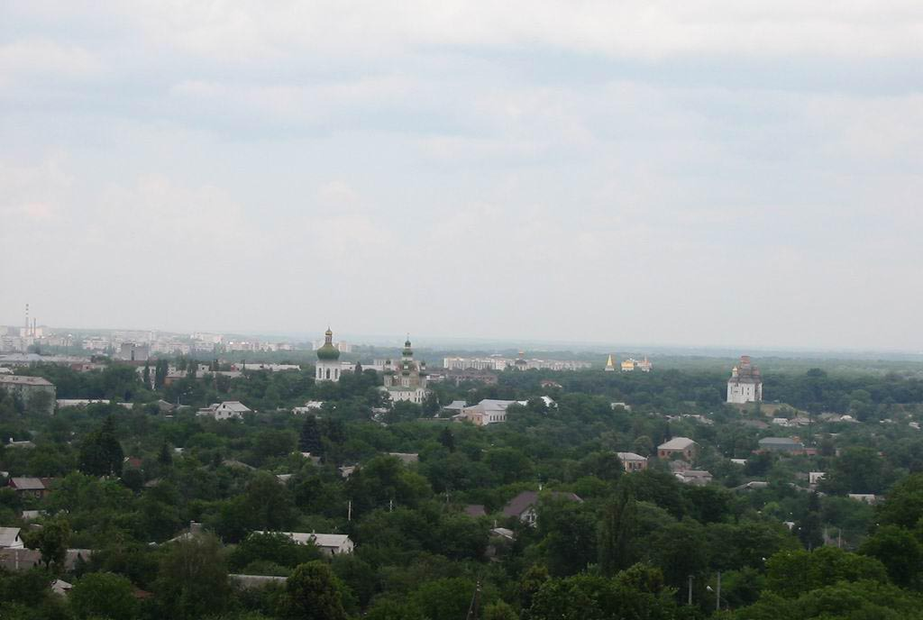 Chernihiv, Ukraine